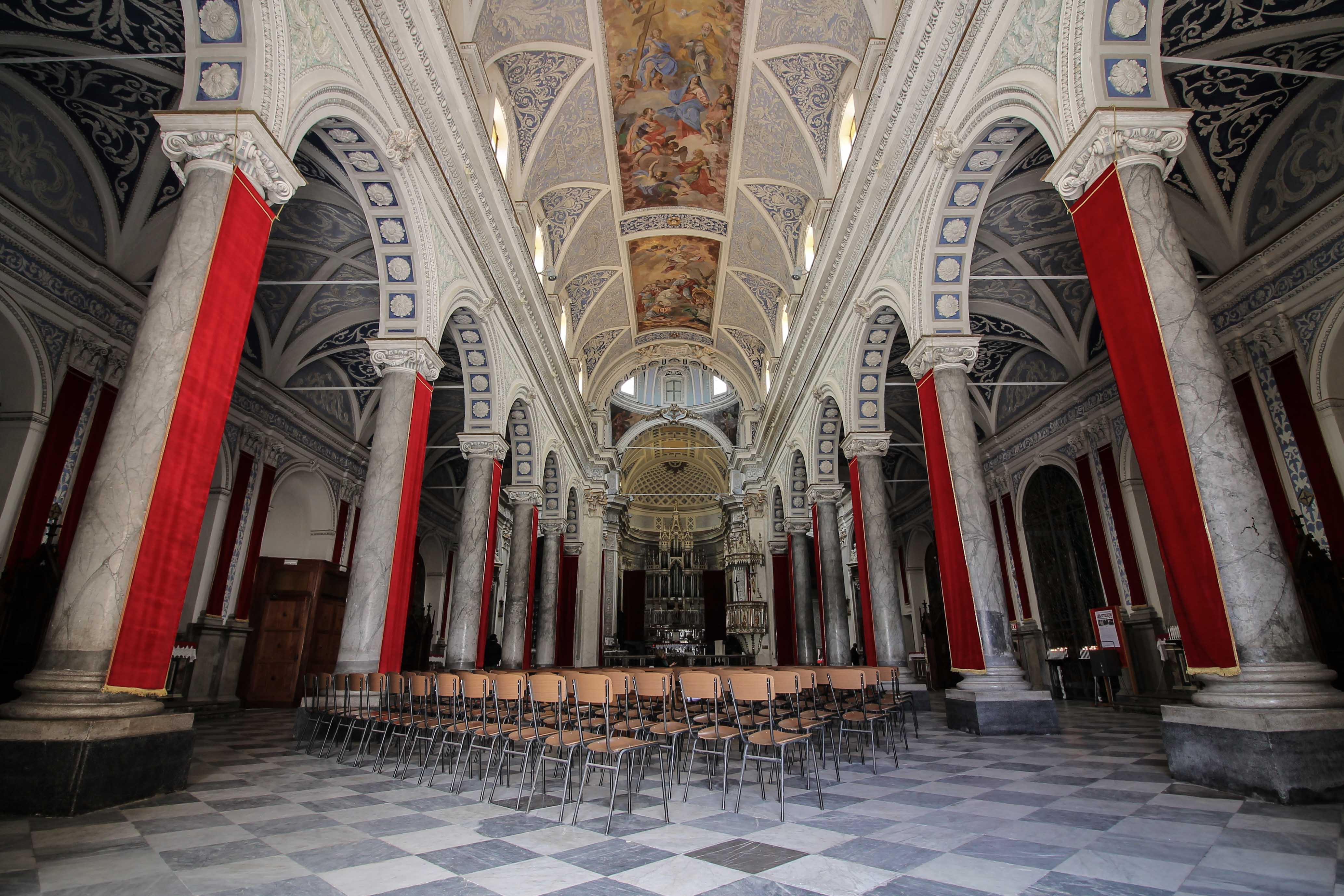 Ex cattedrale dedicata a Santa maria La Cava e i fratelli Alfio, Filadelfo e Cirino, patroni e protettori della città di Lentini. La chiesa ha origine nel periodo paleocristiano, come testimonia la presenza al suo interno, nella navata destra, un complesso di tre arcosoli, scavati nella roccia, luogo di sepoltura dei 3 fratelli. L'attuale chiesa venne costruita dopo il terremoto del 1693 ed ultimata nel 1750. La facciata è di stile tardo barocco, finemente decorata, mentre al suo interno e ricca di decorazioni in stucco, affreschi, tele del XVII-XVIII secolo e molti altri reperti ed opere.